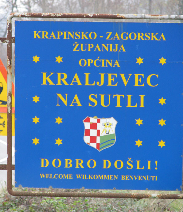 Vjezd do obce Kraljevec na Sutli